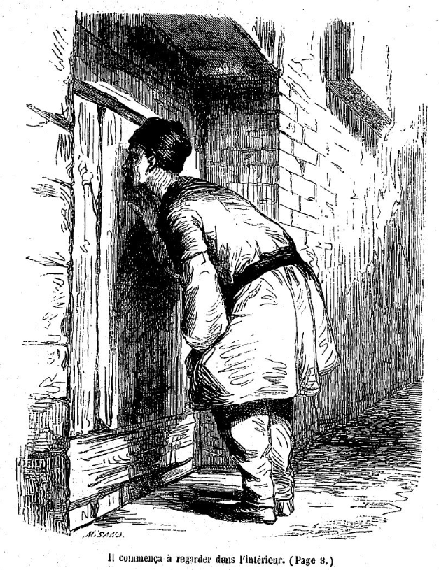 Illustrations de Maurice Sand pour "Kourroglou" de George Sand, dans sa réédition incluse dans les "Œuvres illustrées de George Sand" parues à Paris chez Hetzel, volume 5, 1853 ("Kourroglou" est l'avant-dernier texte du volume 5). Illustration figurant en page 8. (Attention : dans les volumes des "Œuvres illustrées de George Sand", la pagination recommence à 1 au début de chaque texte inclus dans un volume.)